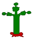 Glifo Náhuatl del municipio de Zapotlán de Juárez, Hidalgo